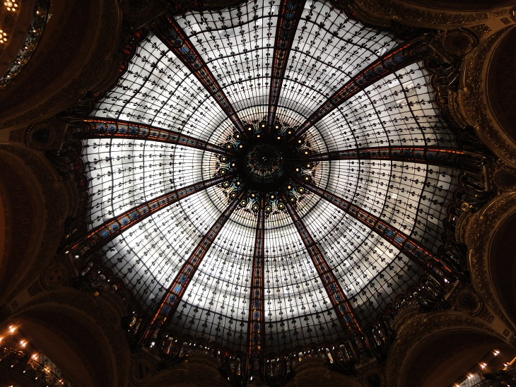 Galeries lafayette 2012